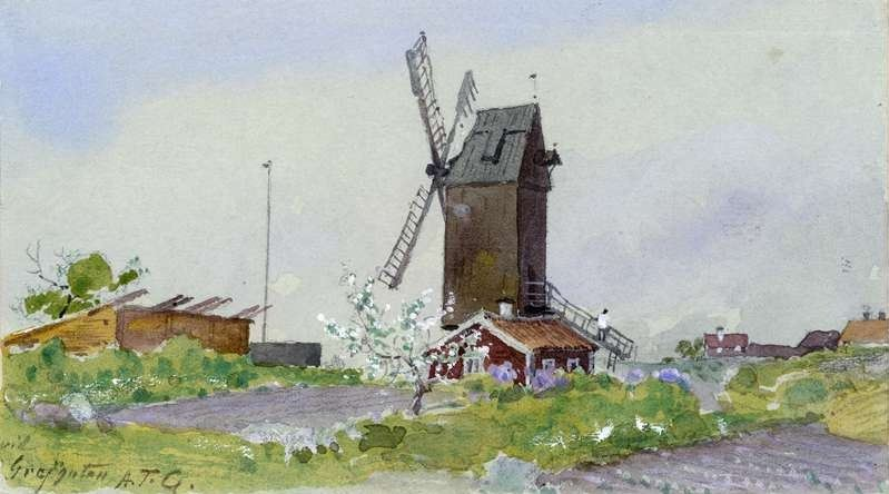 Kvarnen Schultan vid Grevgatan nära Karlaplan. Fotkvarn från 1600-talet namngiven efter en bagare Schult, revs i maj 1888 som Östermalms sista kvarn.